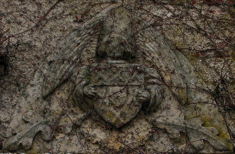 Prieuré du Saint-Sépulcre de Jaligny - Pierre sculptée aux armes d'Antoine de Balzac d'Entraigues, prieur commanditaire du monastère (1456). Un ange aux ailes déployées tient l'écu devant lui.